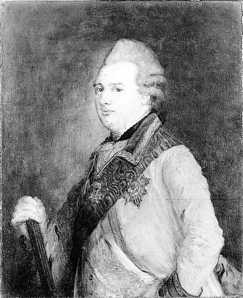 Landgraf Karl von Hessen-Kassel (1744-1836), Bild, Berlin, Staatliche Museen zu Berlin - Preußischer Kulturbesitz, Gemäldegalerie, B.54